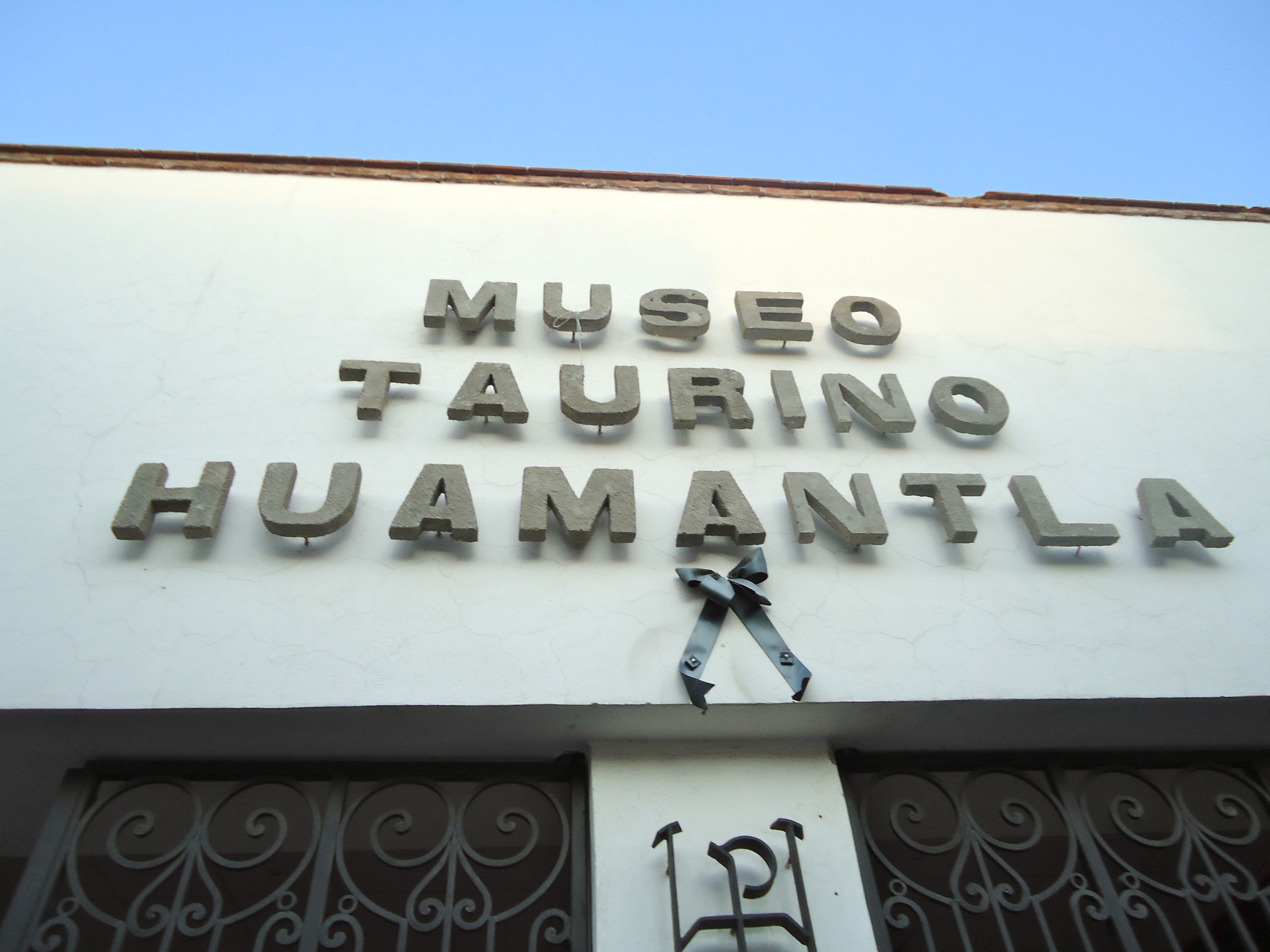 Vista frontal de la entrada del Museo Taurino Huamantla en Tlaxcala